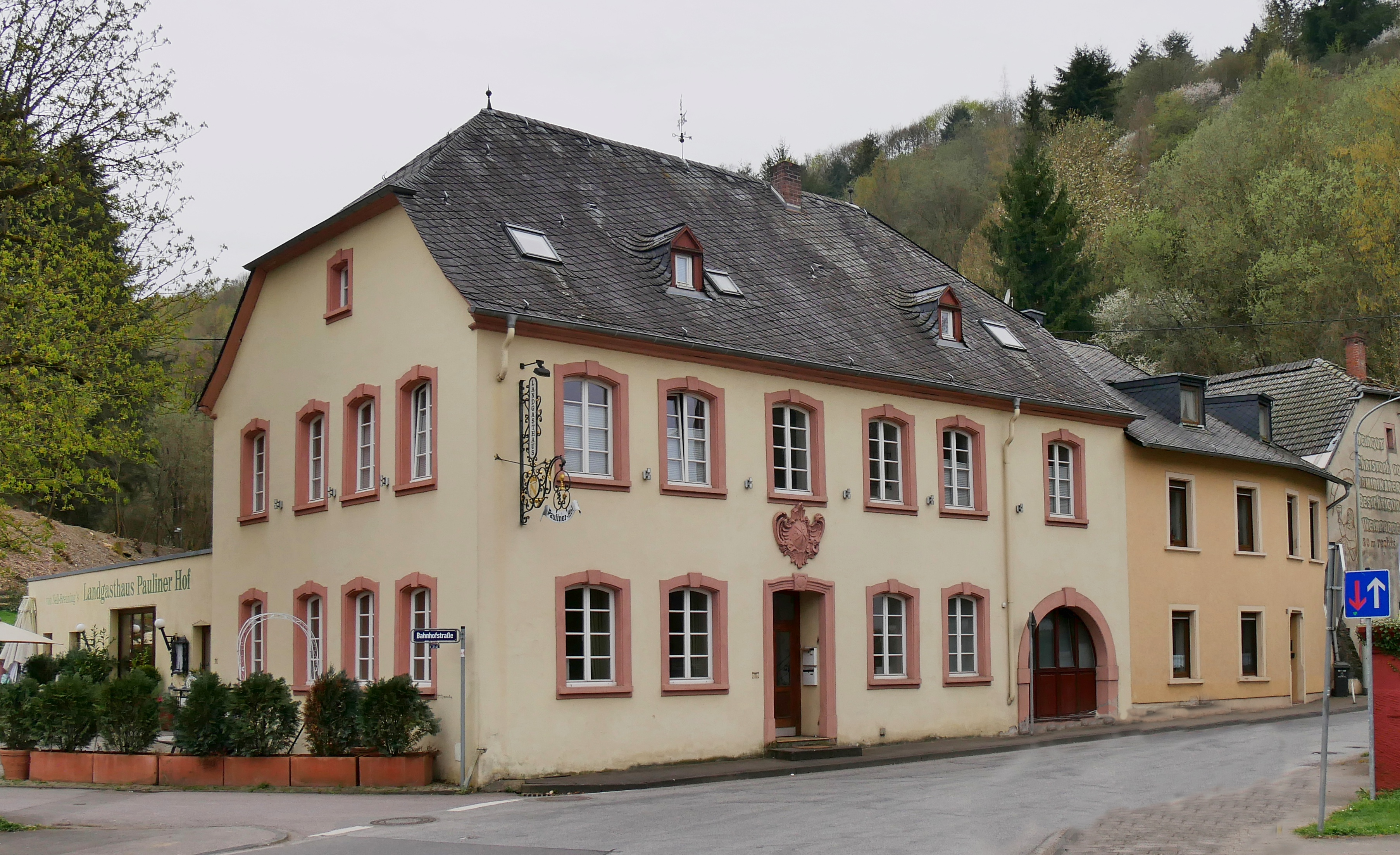 Paulinerhof in Kasel, der ehemalige Hof des Trierer Stifts St. Paulin